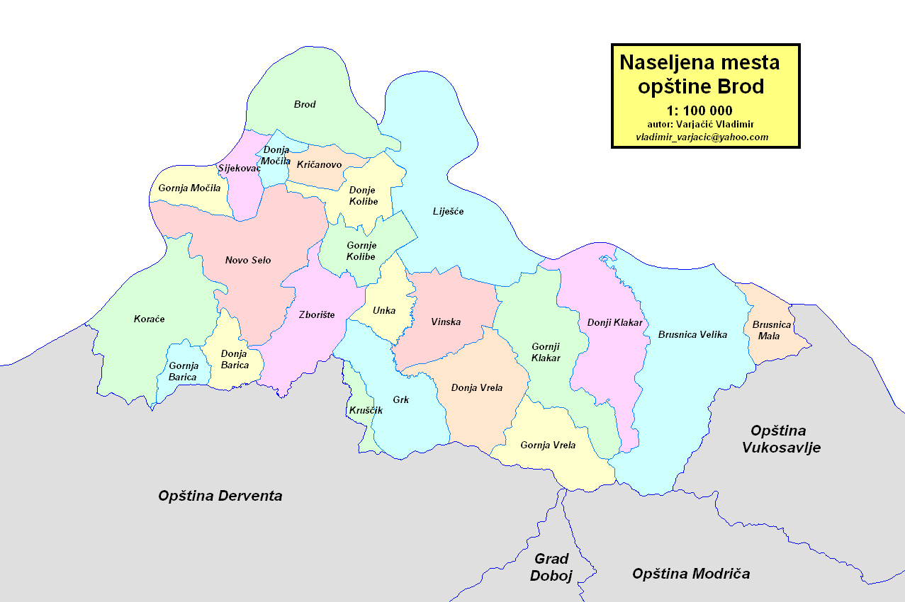 Opština Brod